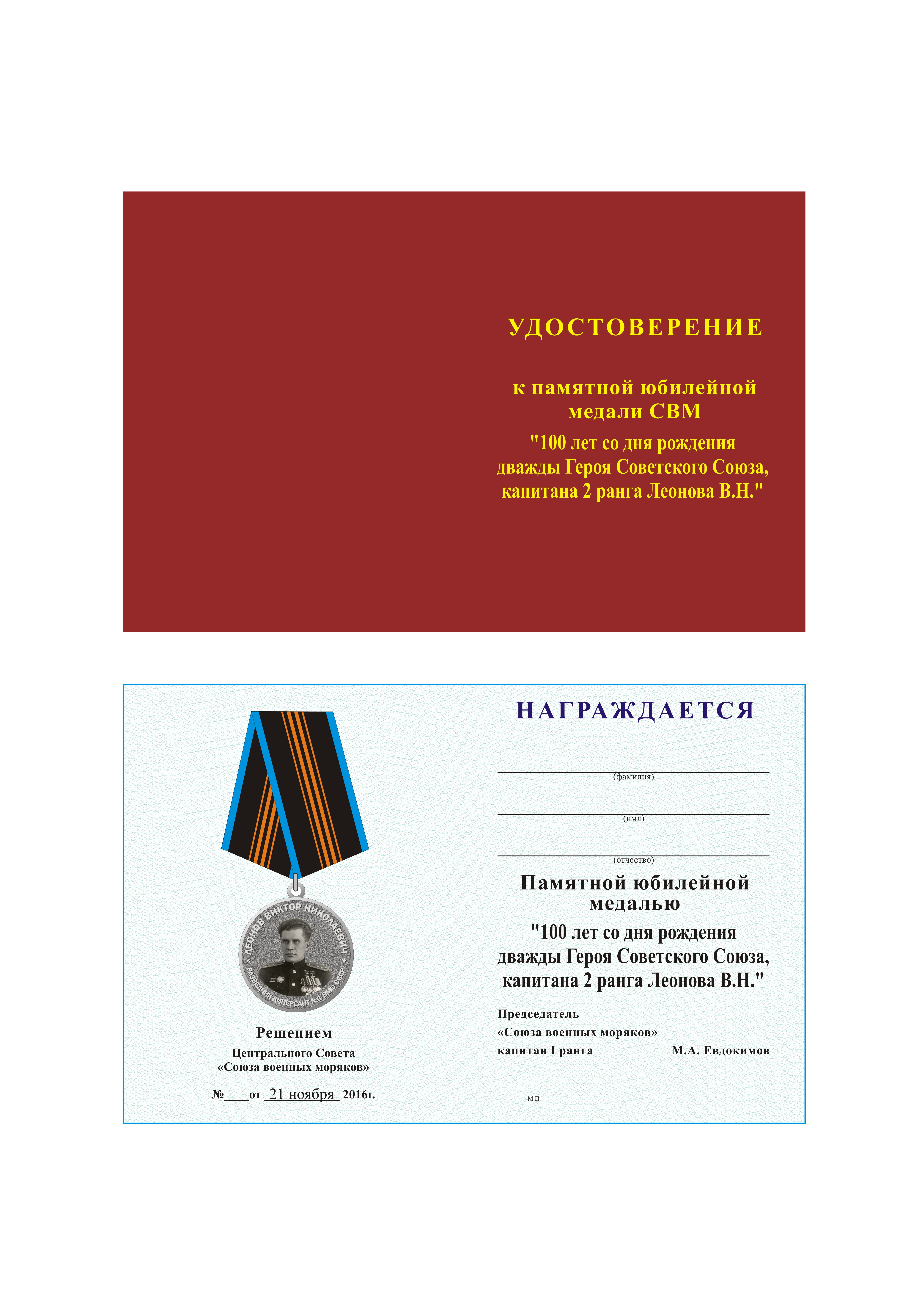 Памятная юбилейная медаль: "100 лет со дня рождения дважды героя Советского Союза капитана 2 ранга Леонова В.Н."